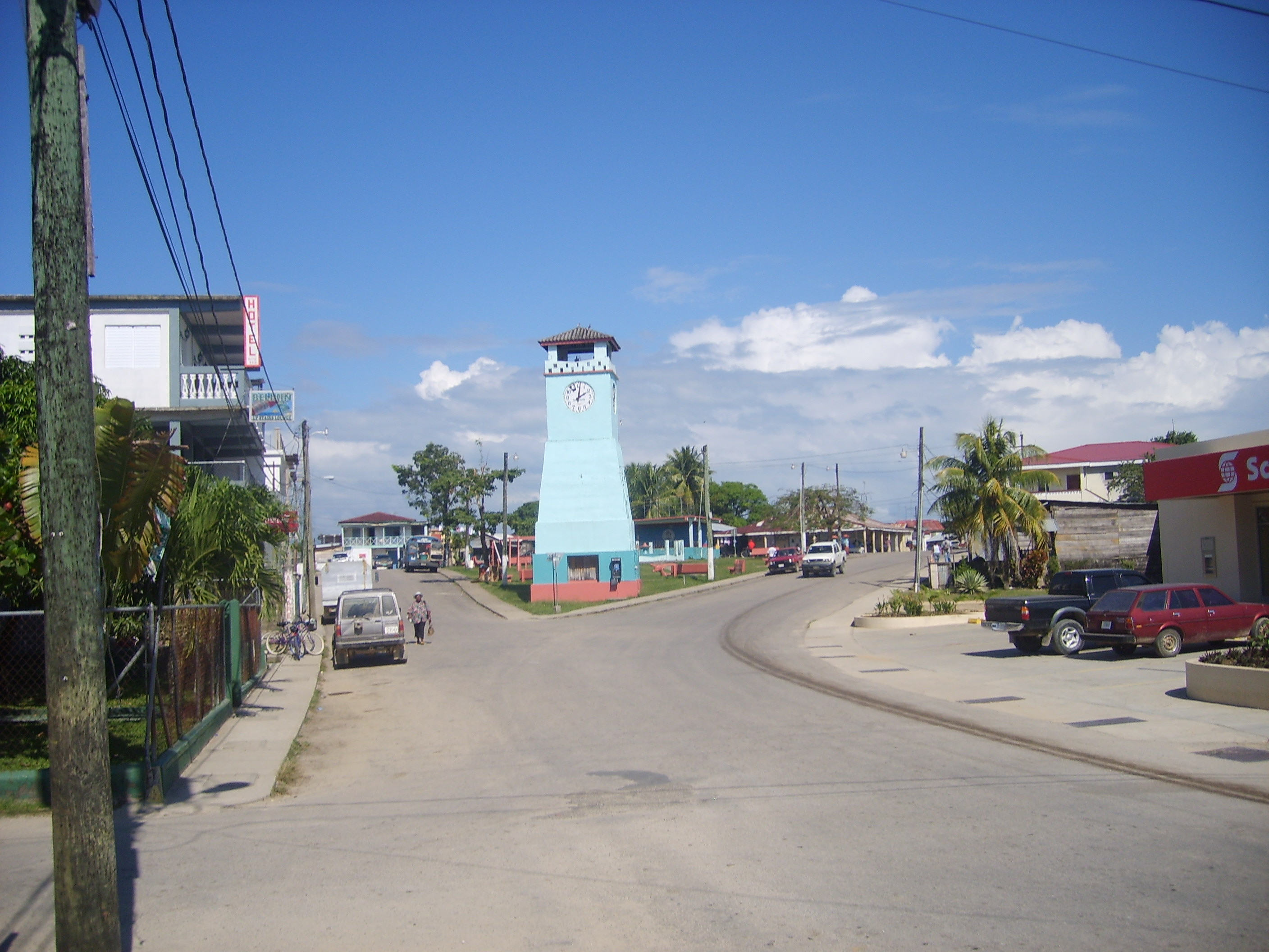 Main square at Punta Gorda, Belize